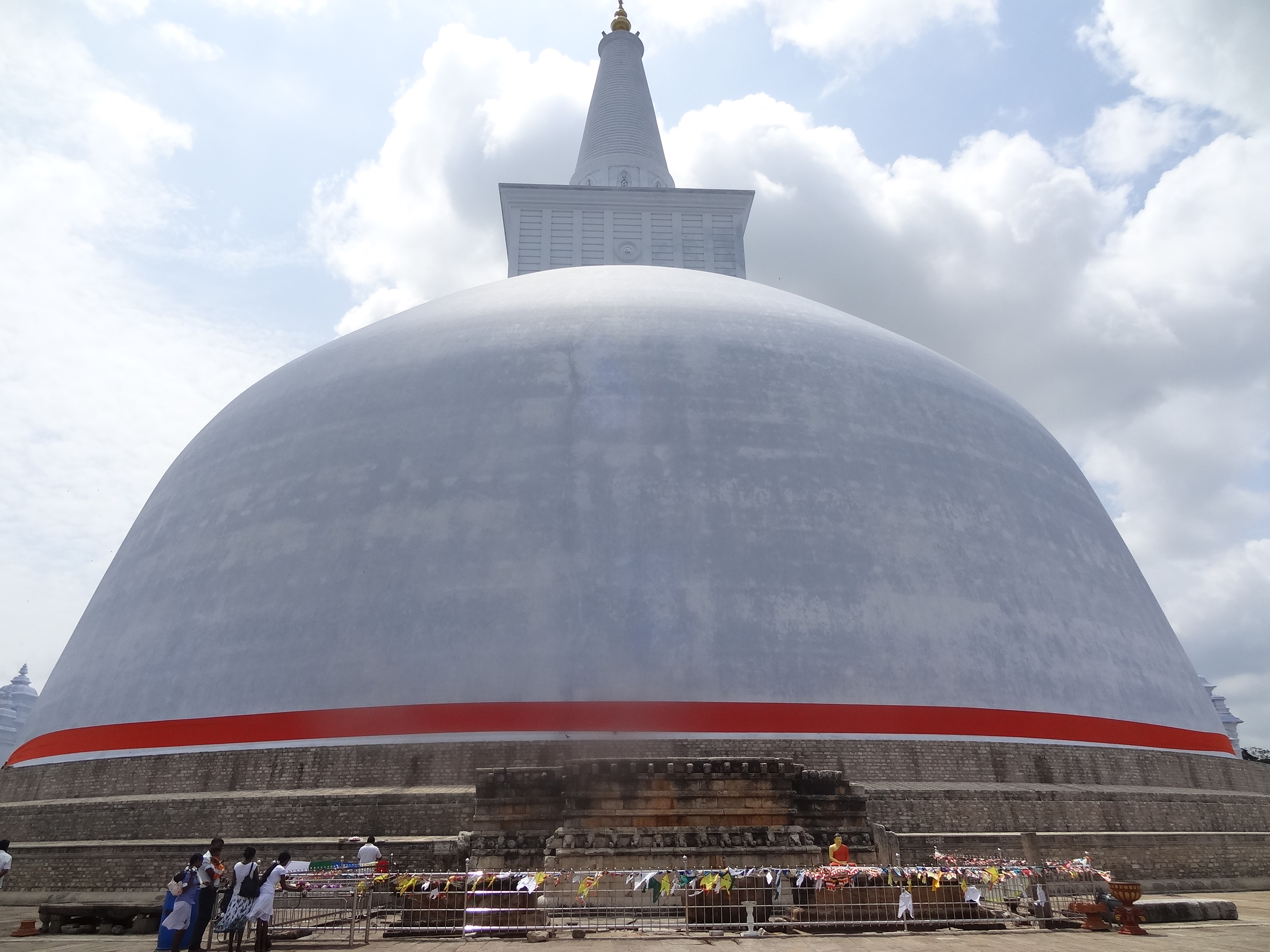 Ruwanwelisaya Stupa